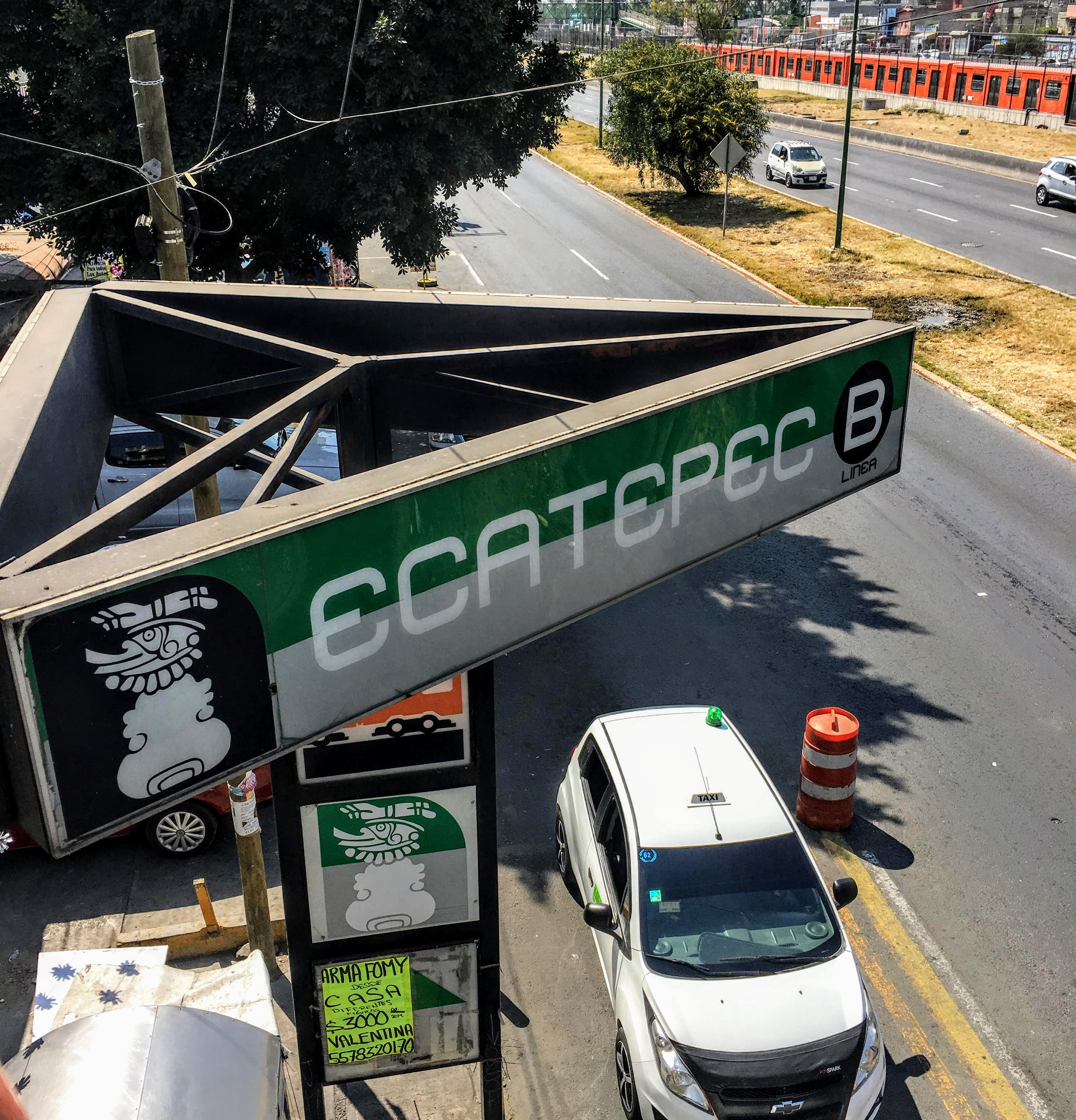 Estación del Metro CDMX en la Linea B